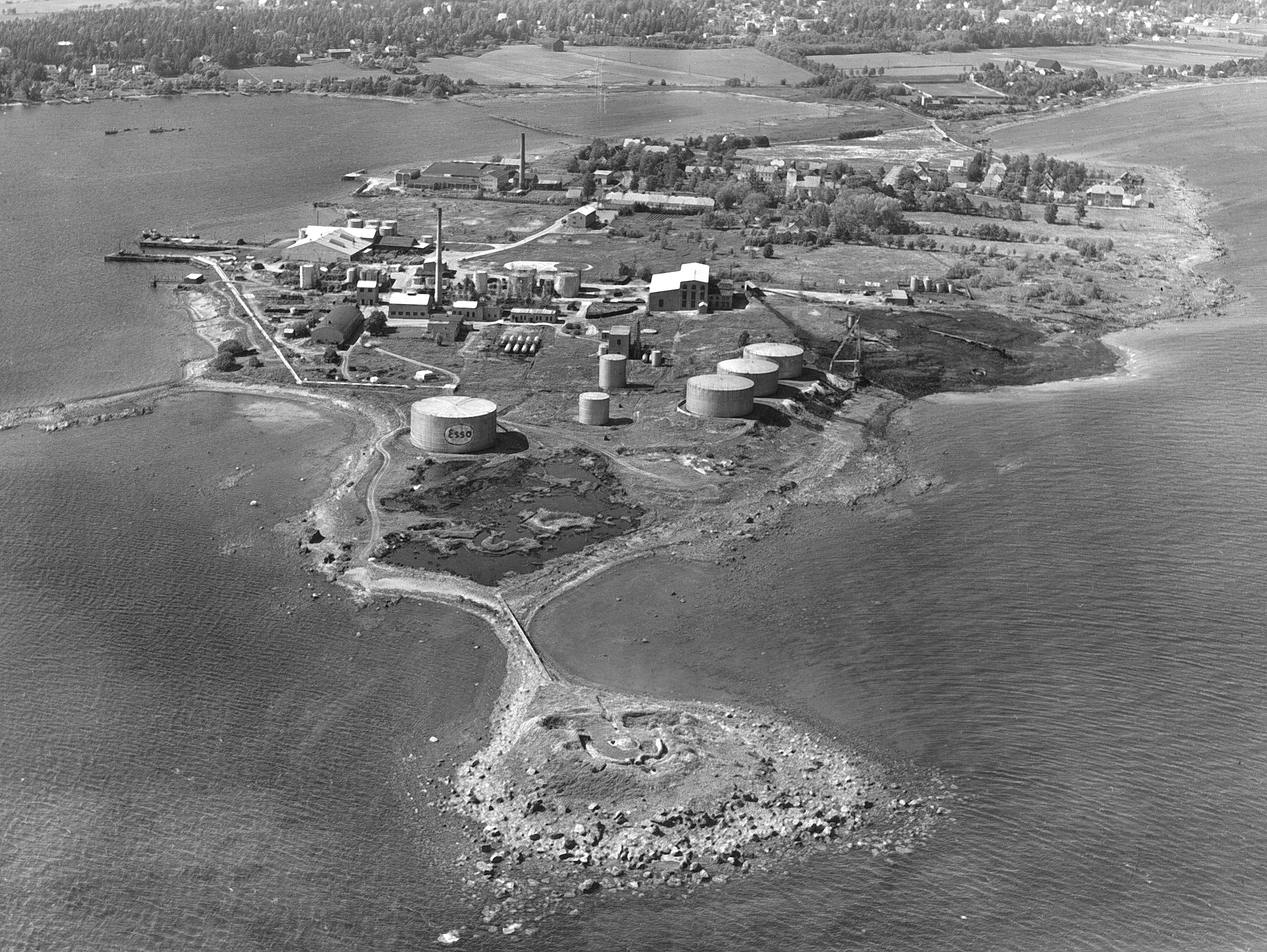 Bildet er hentet fra Arkivverket. Flyfoto. Legg merke til syrebekket med både tippvogner og wire-banen med tårnet ved stranda. Arkivinstitusjon : Statsarkivet i Stavanger Arkivnavn : Pa 1536 - Esso Norge as, Vallø Oljeraffineri og lager Sted : Norge, Vestfold, Tønsberg, Valløy Emneord: Olje, Oljeraffineri, Petroleum Avbildet